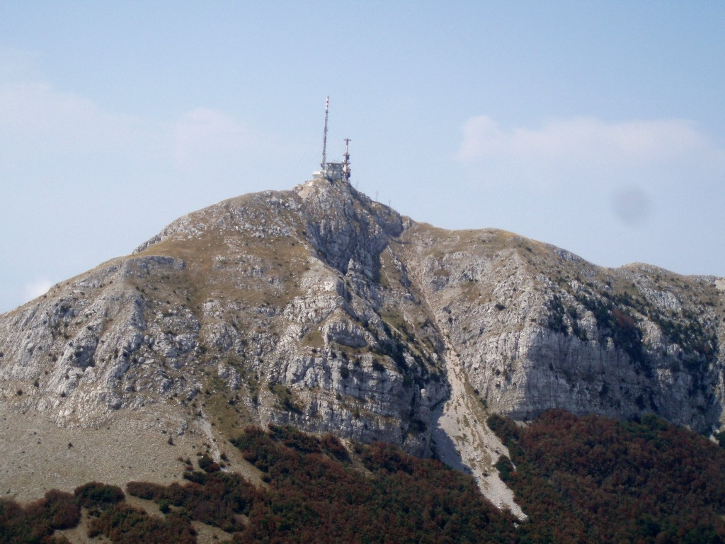 ગુજરાતી: Stirovnik, Lovcen